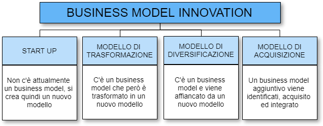 Diagramma a blocchi innovazione nei modelli di business